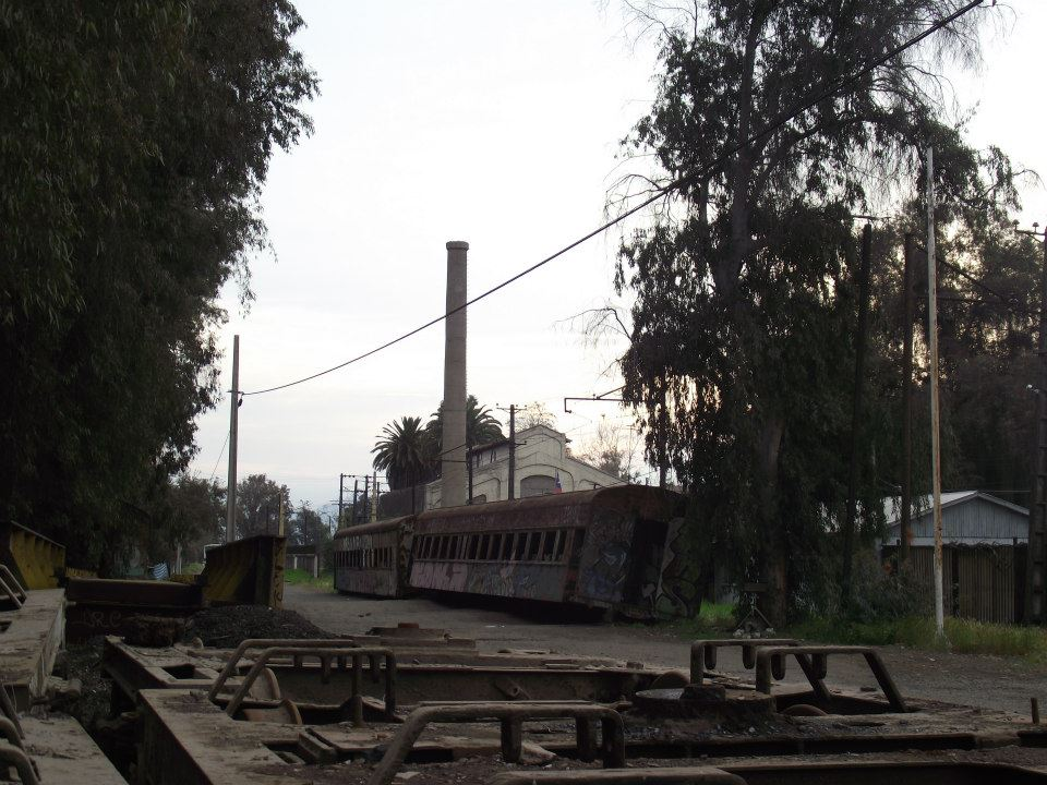 Ex maestranza de ferrocarriles, en Santiago.